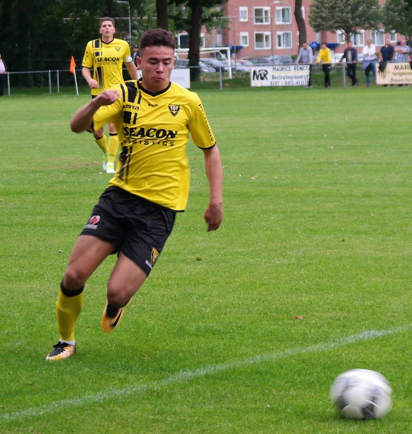 Aktie foto Tristan Dekker